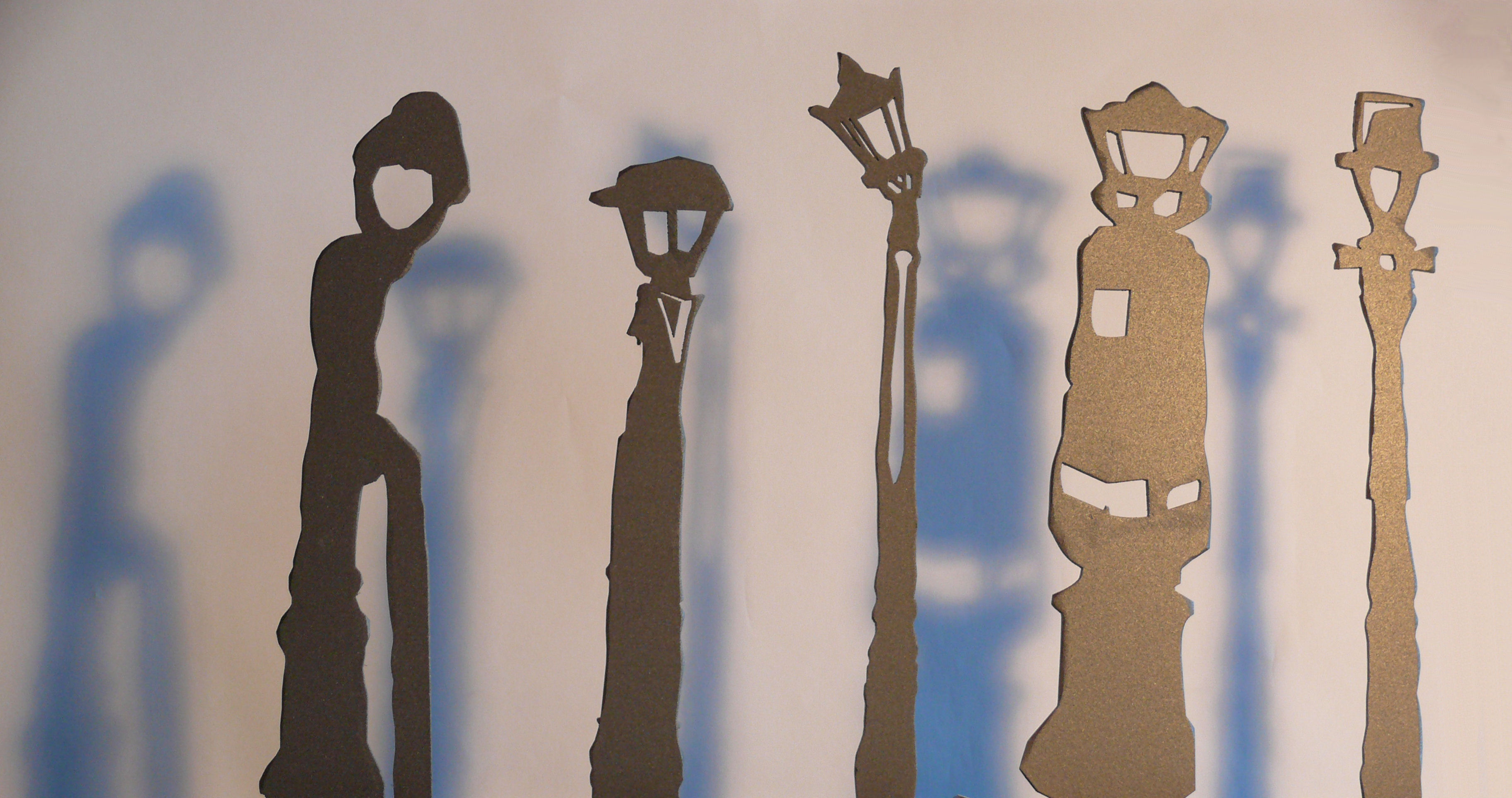 Kleine Modelle der Sprechenden Laternen aus Celle. Diese ca. 40 cm hohen Metallskulpturen wurden im November 2008 den Sprechern der "echten" Sprechenden Laternen in der Celler Altstadt als Geschenk überreicht. Die Skulpturen sind nicht ganz maßstabsgerecht zueinander. Diese Abbildung dient der Zuordnung der Namen zu den einzelnen Laternen. Von links nach rechts "Oma Lilo", "Kind Jonas", Langer Lulatsch Olli", "Dicke Gerlach, "Perfekte Herr Westphal"